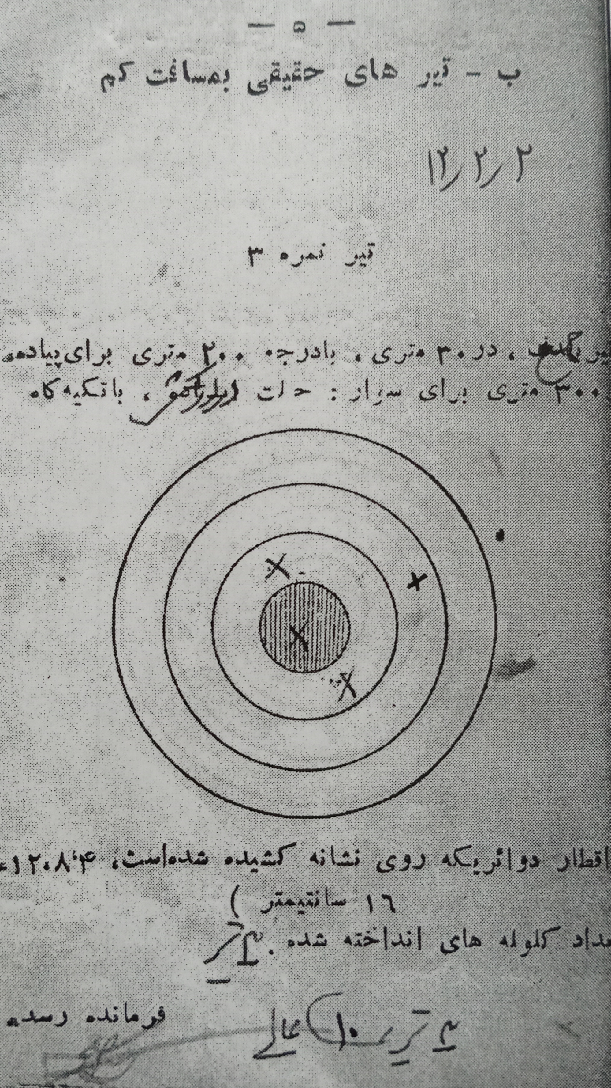 سوابق سربازی